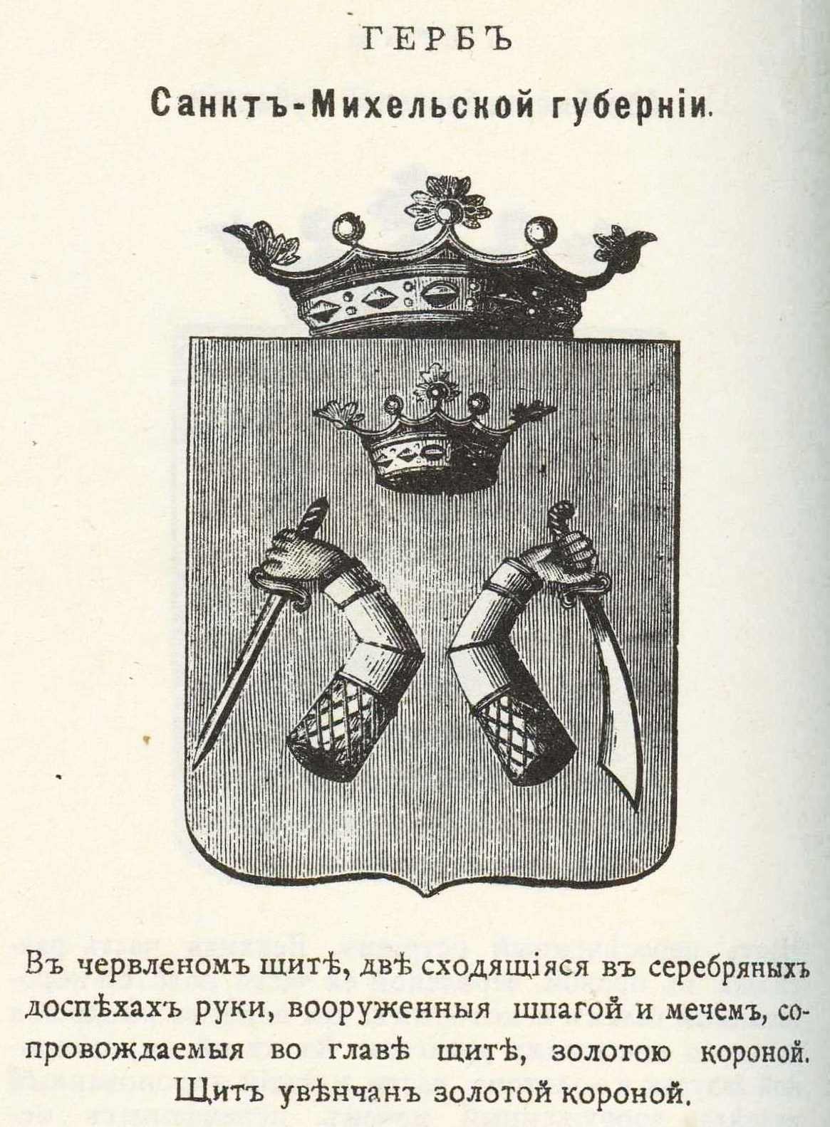 Official Russian Empire Sankt-Mikhel Governorate coat of arms. Герб Санкт-Михельской губернии Российской Империи Великого Княжества Финляндского с официальным описанием в Гербовнике Винклера.